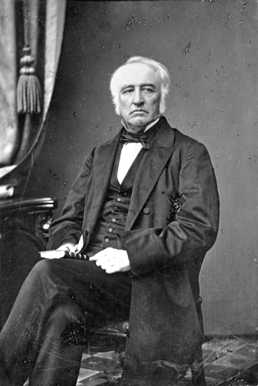 Augustin-Norbert Morin